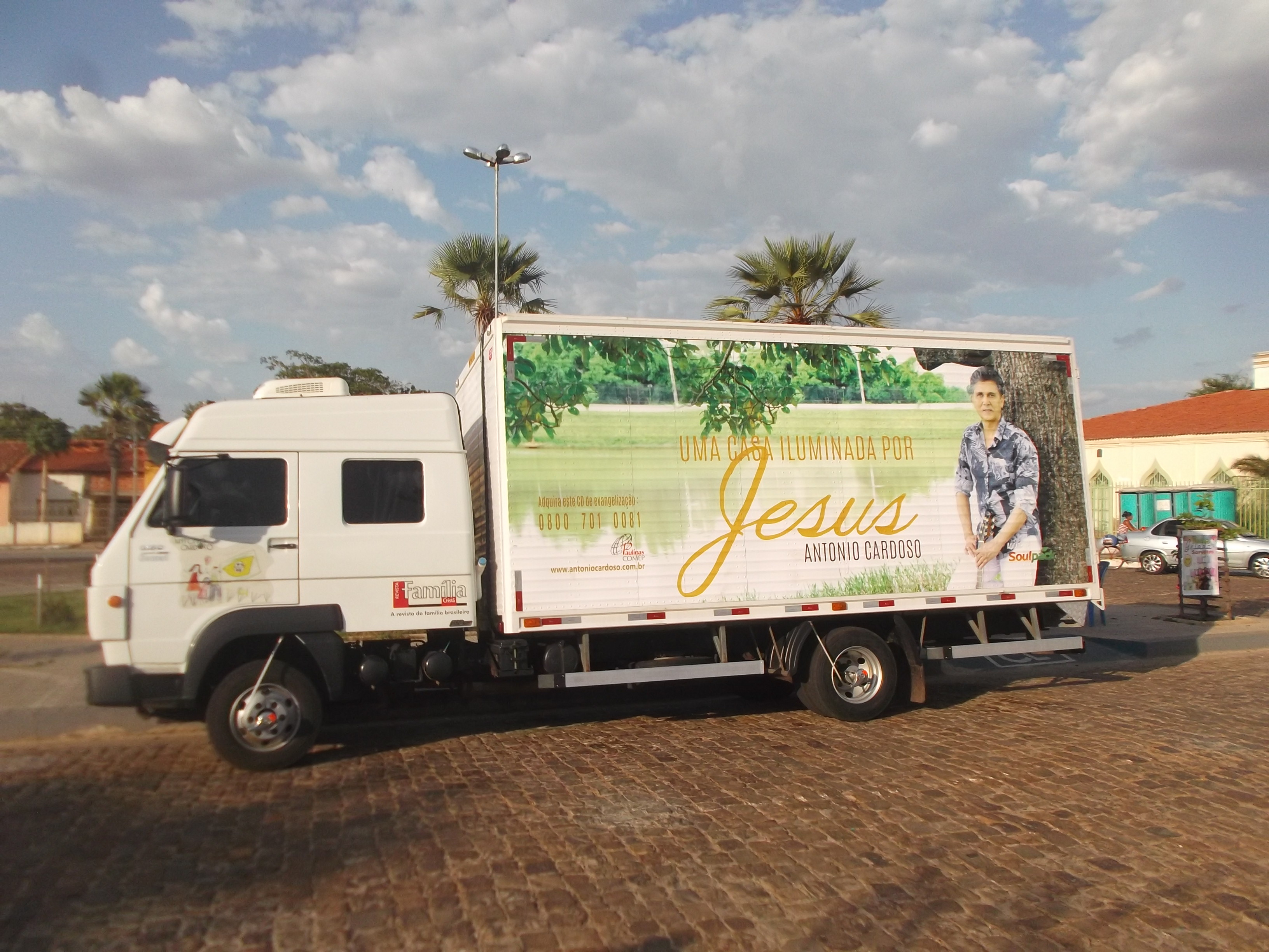 Caminhão do cantor, músico e compositor Antonio Cardoso na Praça Bona Primo, em Campo Maior, quando do show dos 300 anos da Igreja de Campo Maior.